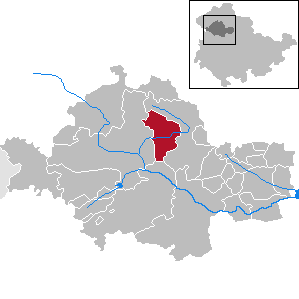 Körner in Thuringia - Unstrut-Hainich-Kreis